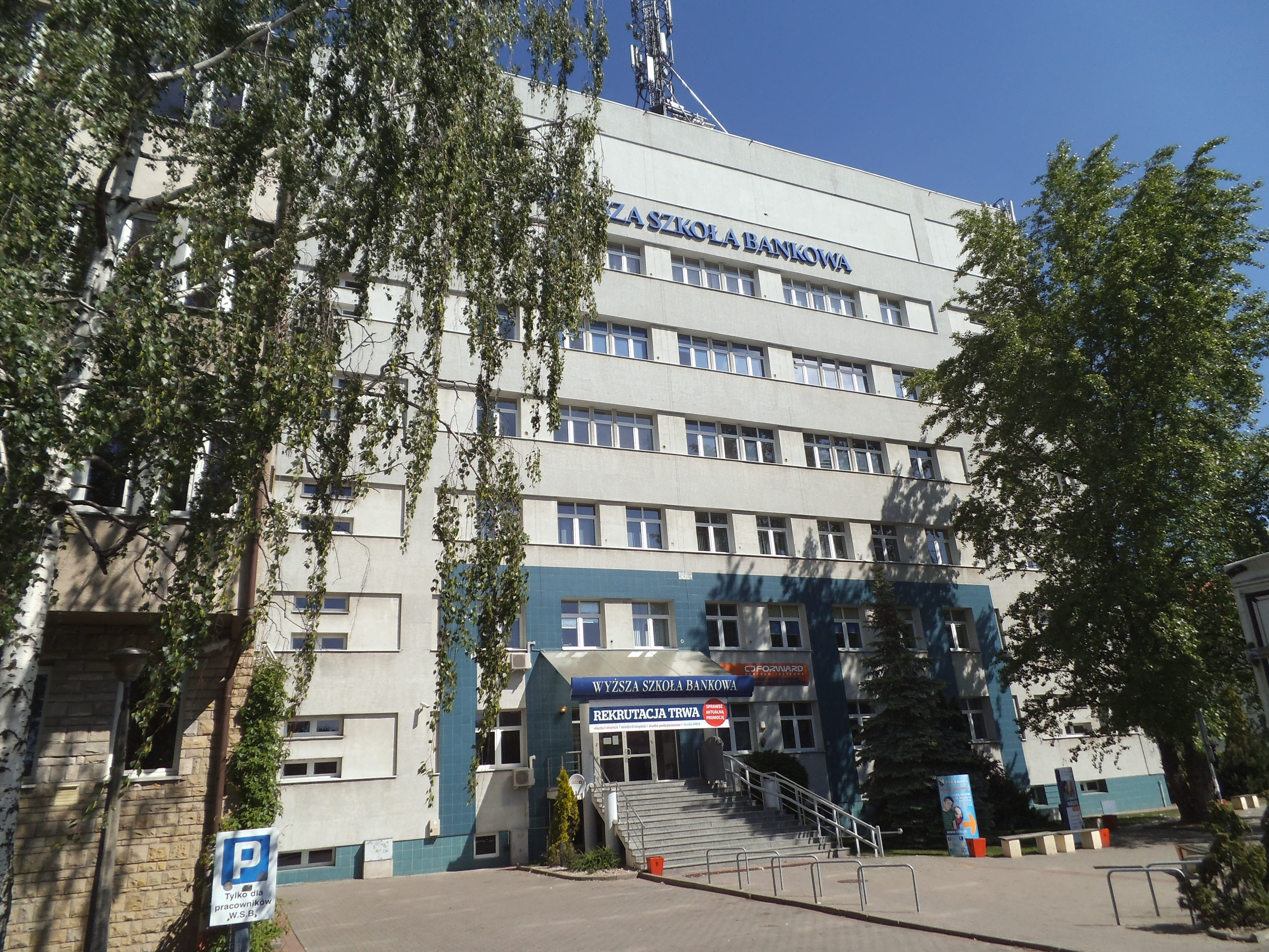 Wyższa Szkoła Bankowa w Toruniu